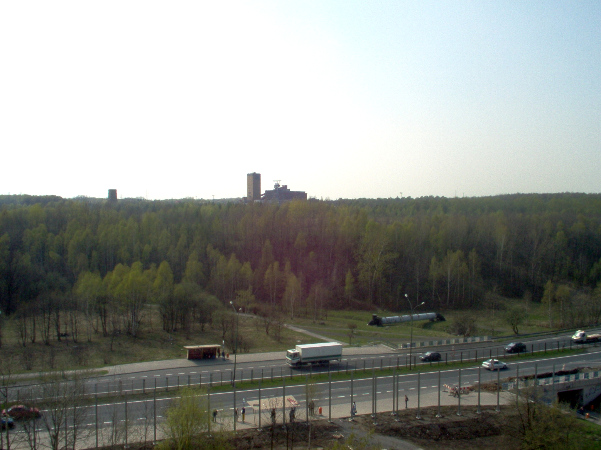 Kopalnia Staszic i droga krajowa nr 1 - osiedle Giszowiec.Zdjęcie mojego autorstwa.